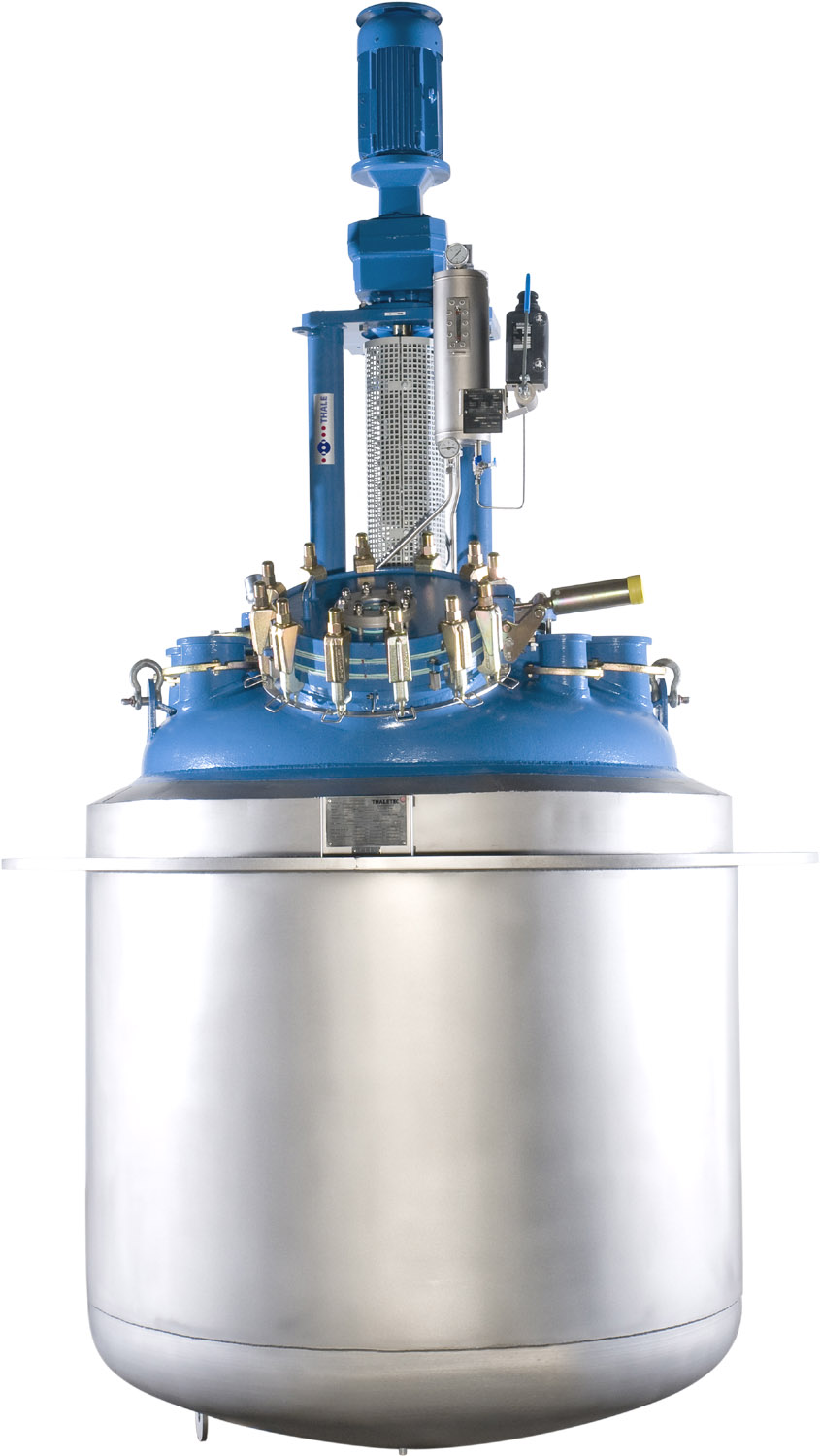 Emaillierter Rührbehälter Bauform BE